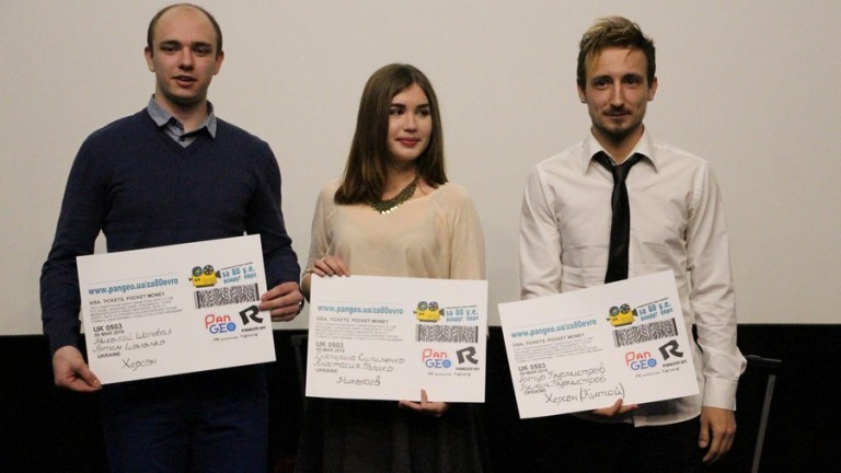 Представители команд-победителей 1 этапа Международного видео-марафона "За 80 у.е. вокруг Евро"